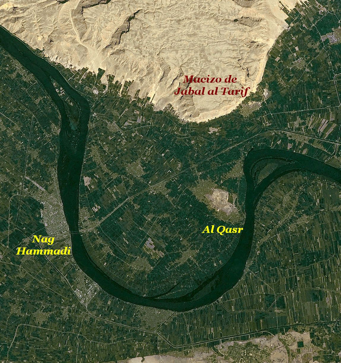 Mapa satelital ubicando las poblaciones de Nag Hammadi, Al Qasr wa al-Sayyad (la antigua Quenoboskion) y el macizo montañoso de Jabal al-Tarif.